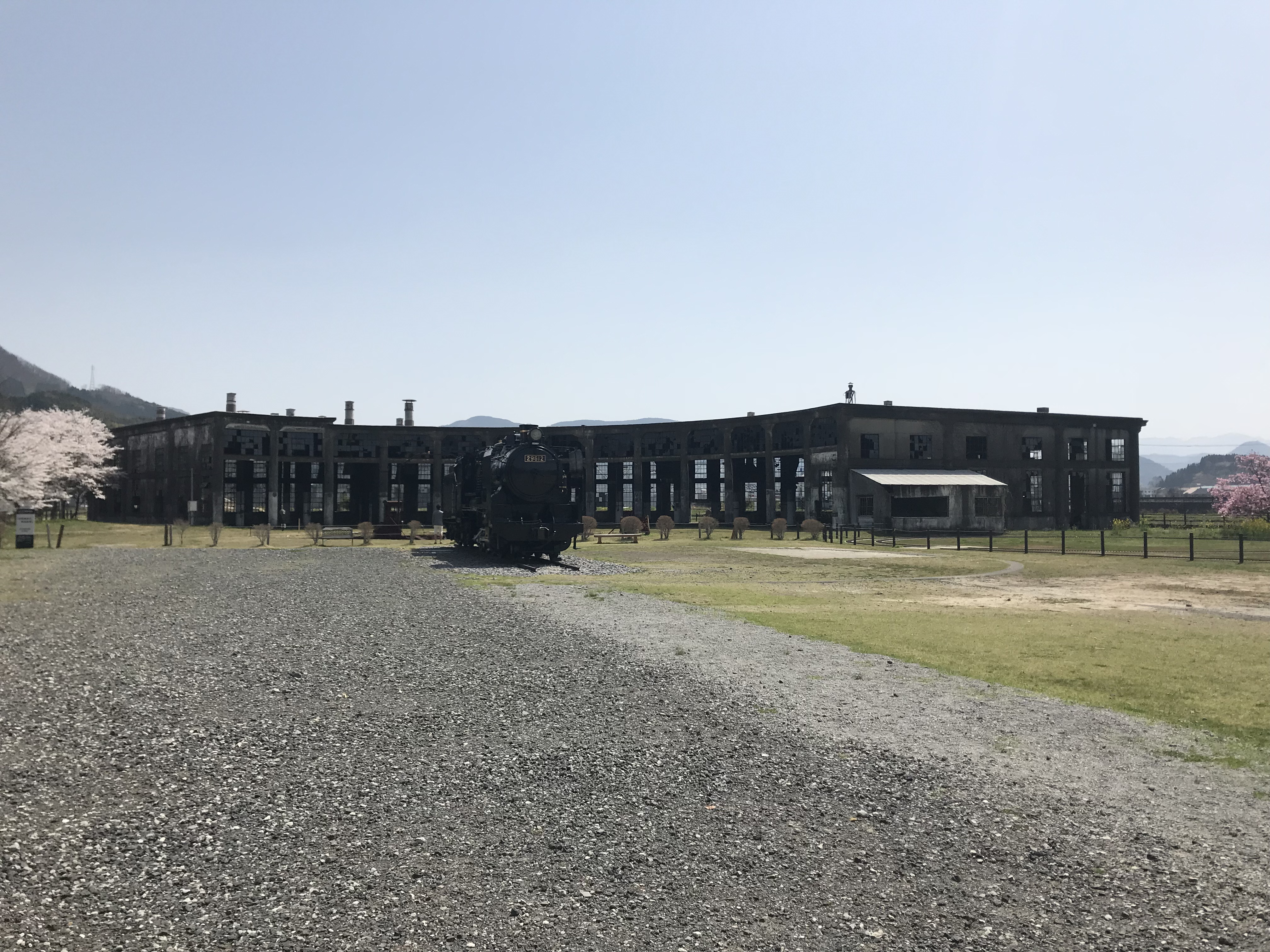 豊後森機関庫